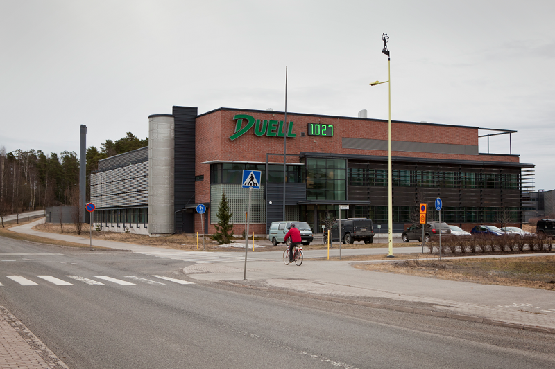 Duell Yhtiöiden pääkonttori Turussa.